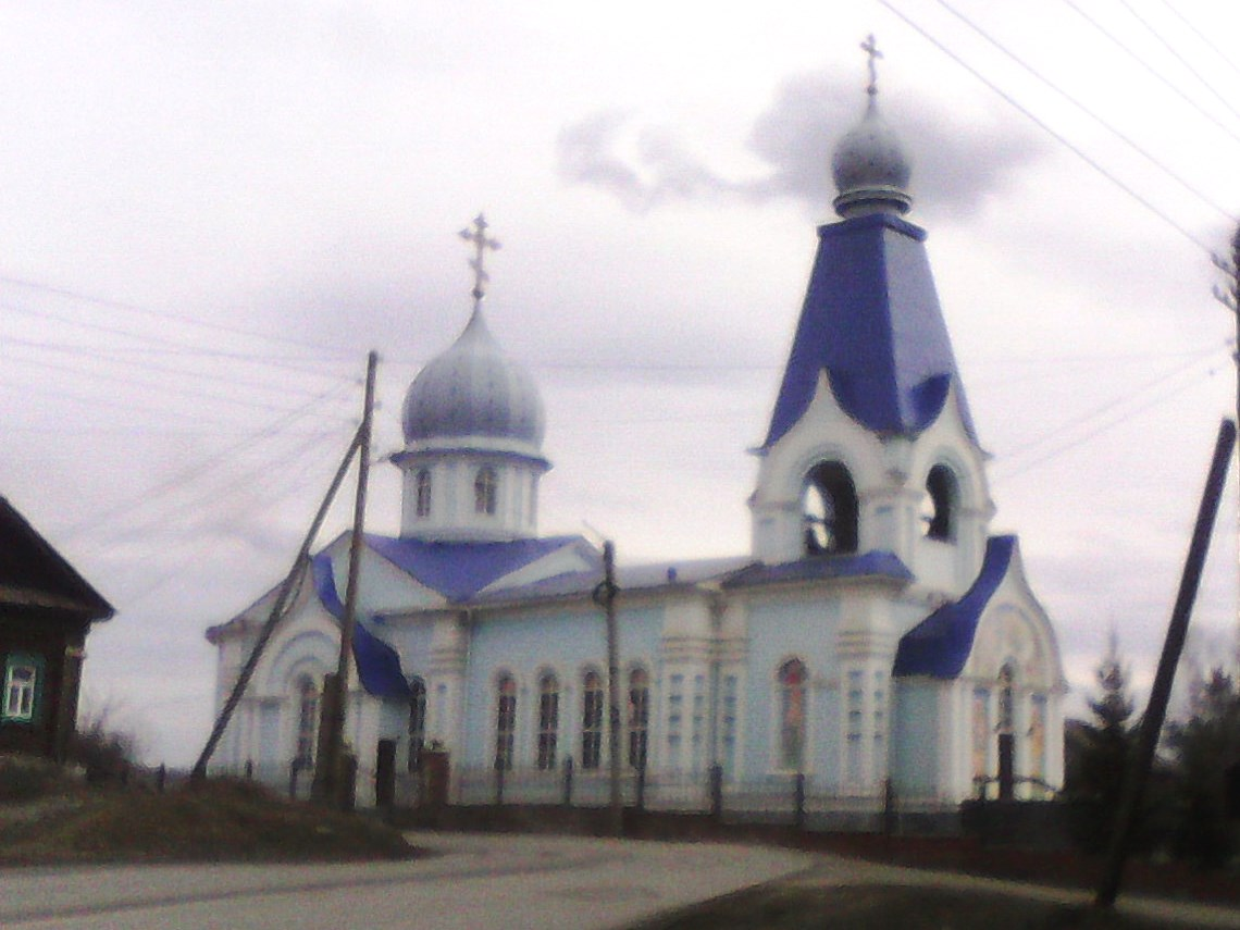 Храм Рождества Пресвятой Богородицы в городе Верхний Уфалей. Перекрёсток улиц Прямицына, Кирова, Пионерской.